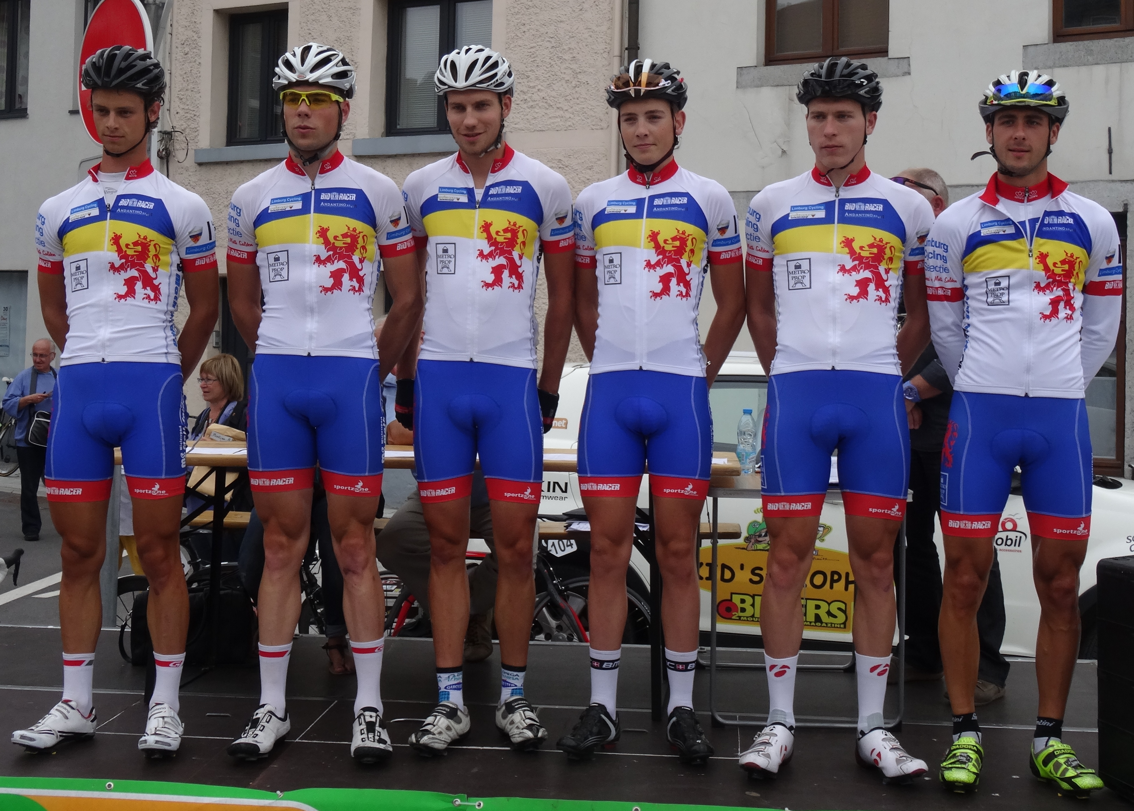 Reportage photographique réalisé le mercredi 6 août à l'occasion du départ de la première étape du Tour de la province de Namur 2014 à Jambes (Namur), Belgique.